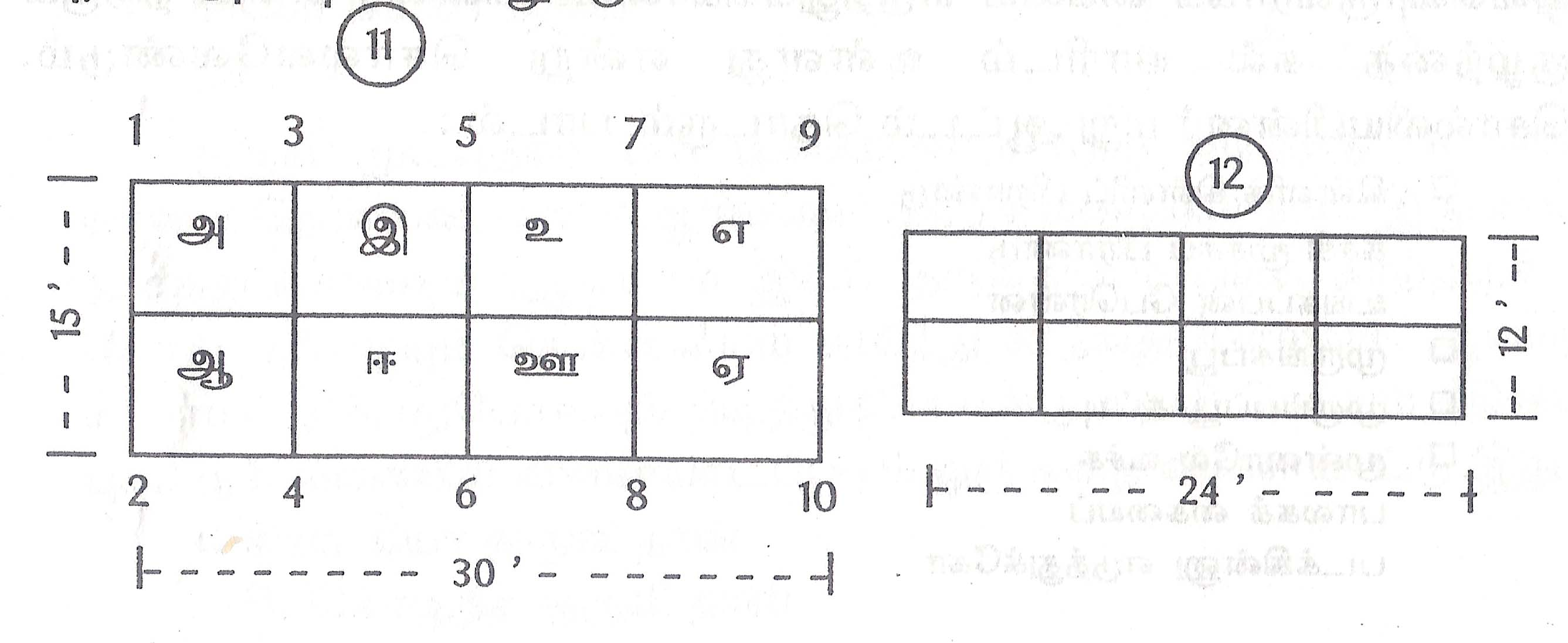 கிளித்தட்டு விளையாட்டு அரங்கம். எனது நூல் 'மறைகின்ற விளையாட்டுகள்' பக்கத்திலிருந்து எடுக்கப்பட்டது. own creation.